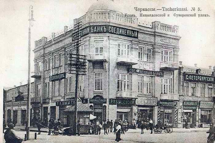 На розі вулиць Миколаївська-Суворовська